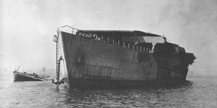 元日本陸軍特2TL型戦時標準船『山汐丸』（右）、元日本海軍標的艦『大指』（左、艦首のみ水上に露出）、横浜港